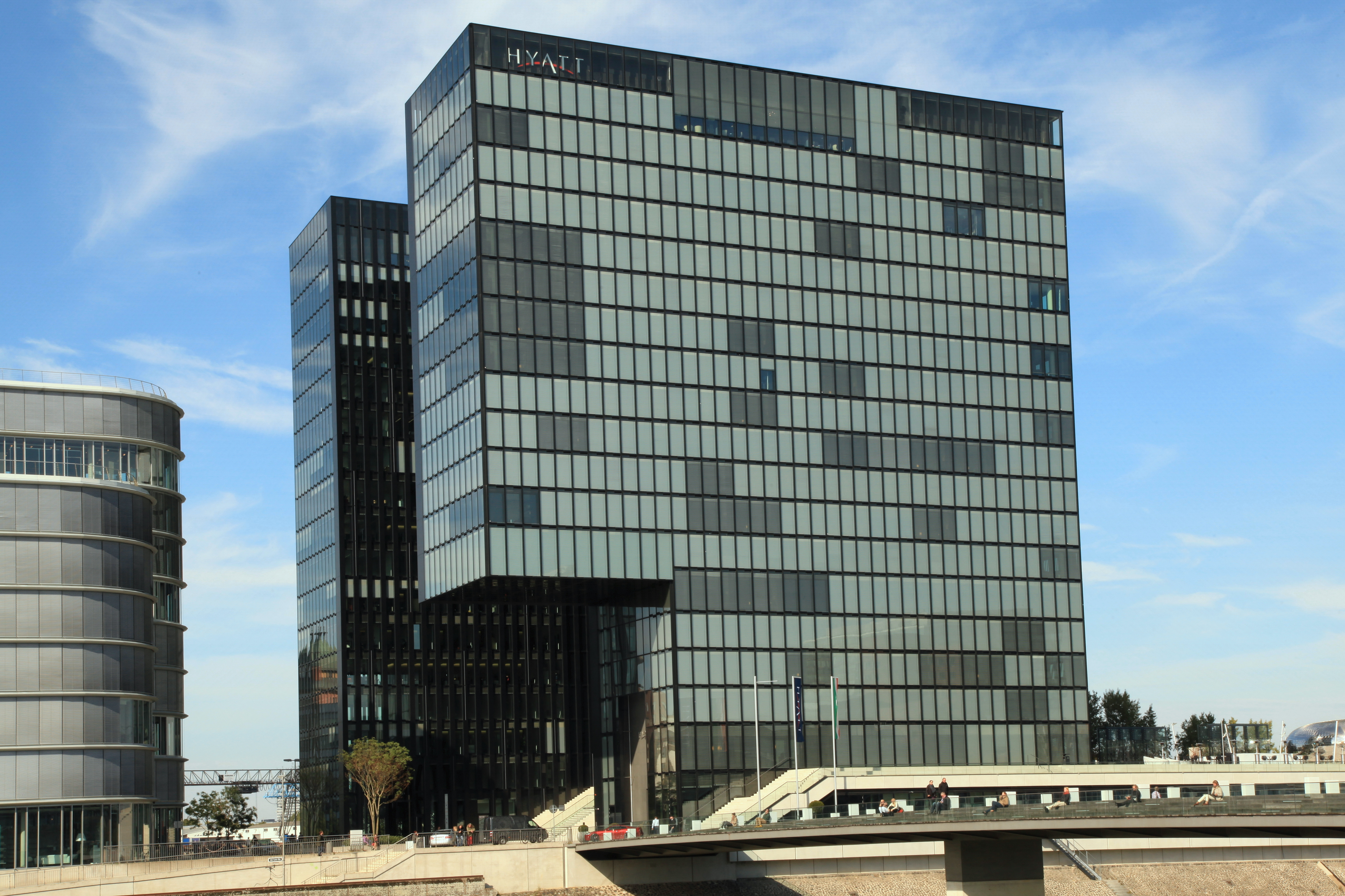 Blick von Am Handelshafen zum Hyatt Regency (vorn) und zur Speditionstraße 21 (hinten) an der Hafenspitze in Düsseldorf